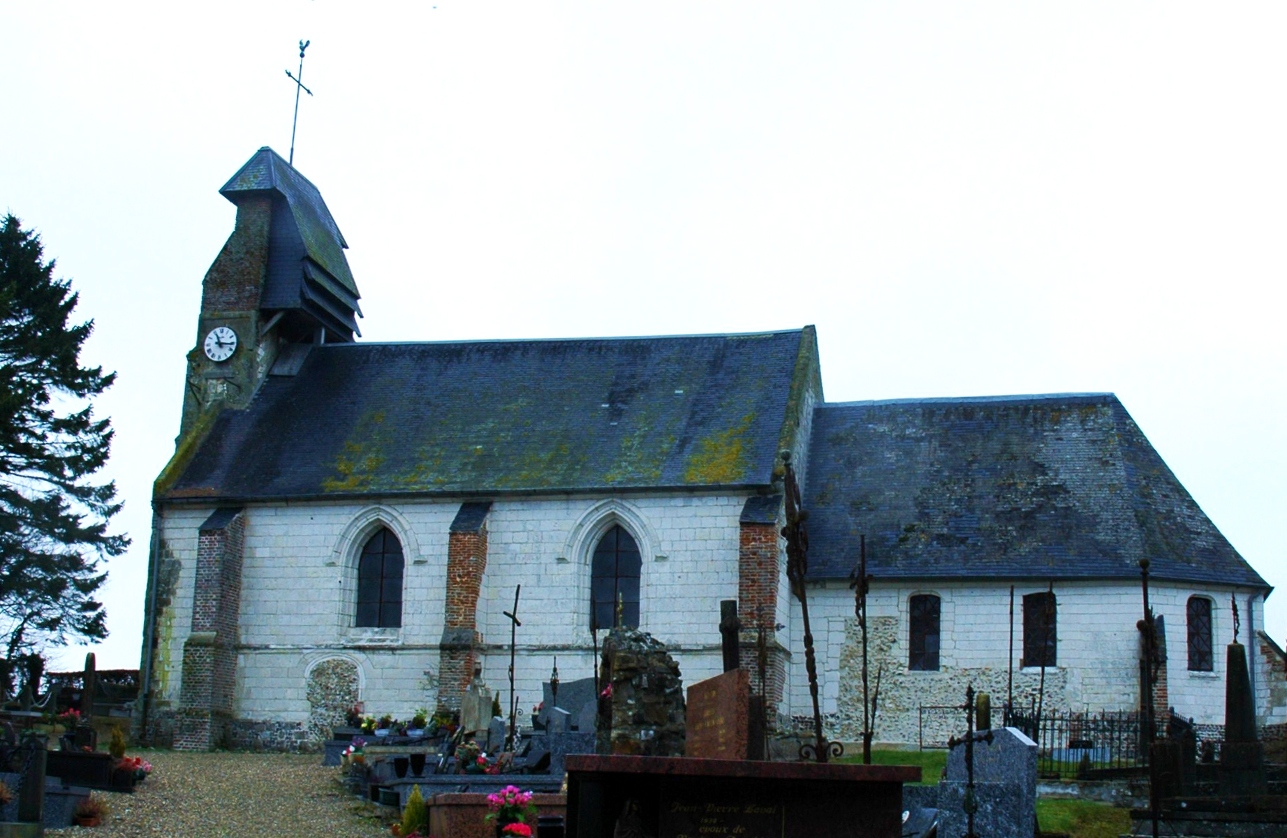 Machiel (Somme, France). L'église St-Pierre.